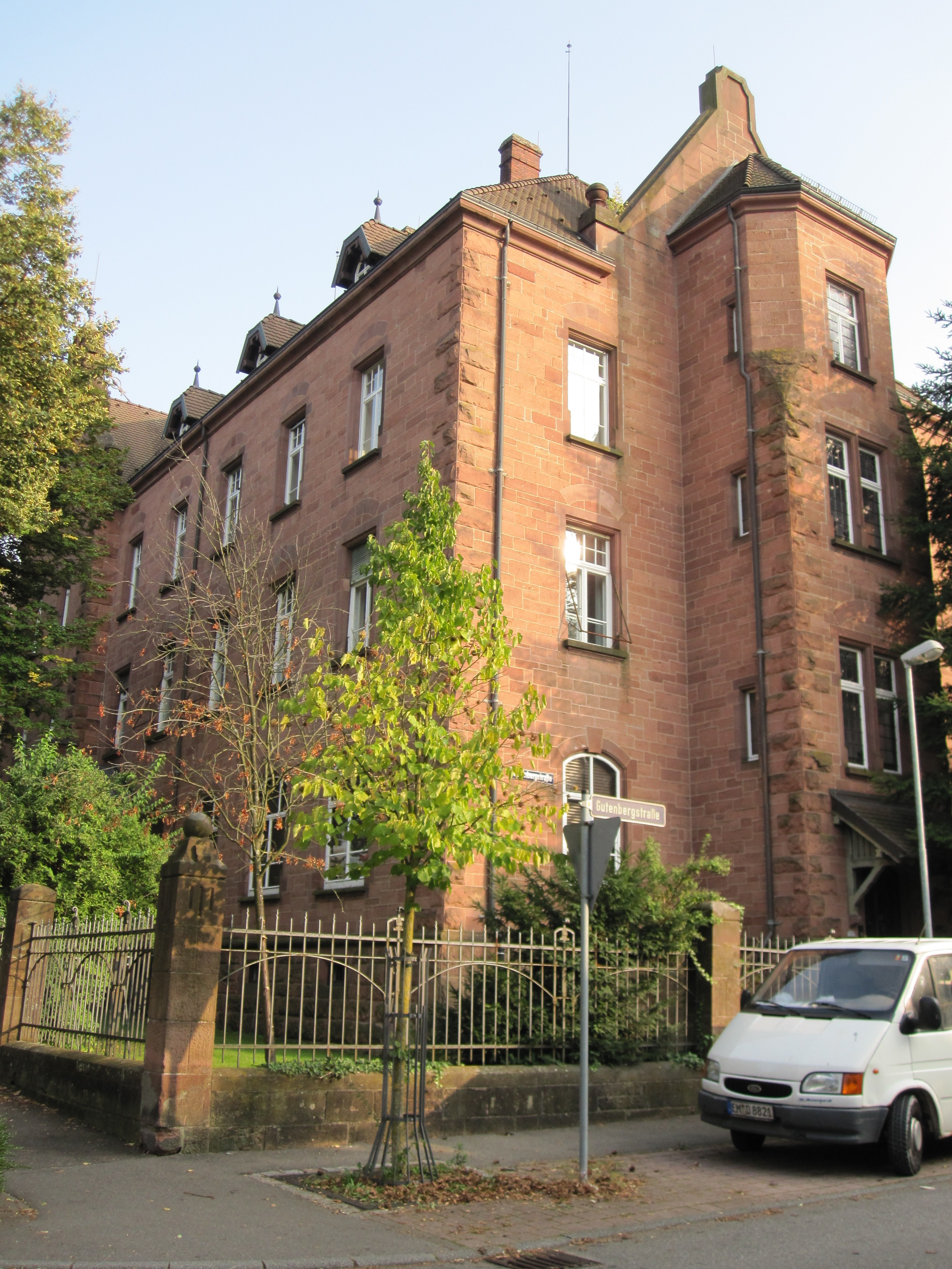 Amtsgerichtsgebäude in Waldkirch/Baden-Württemberg